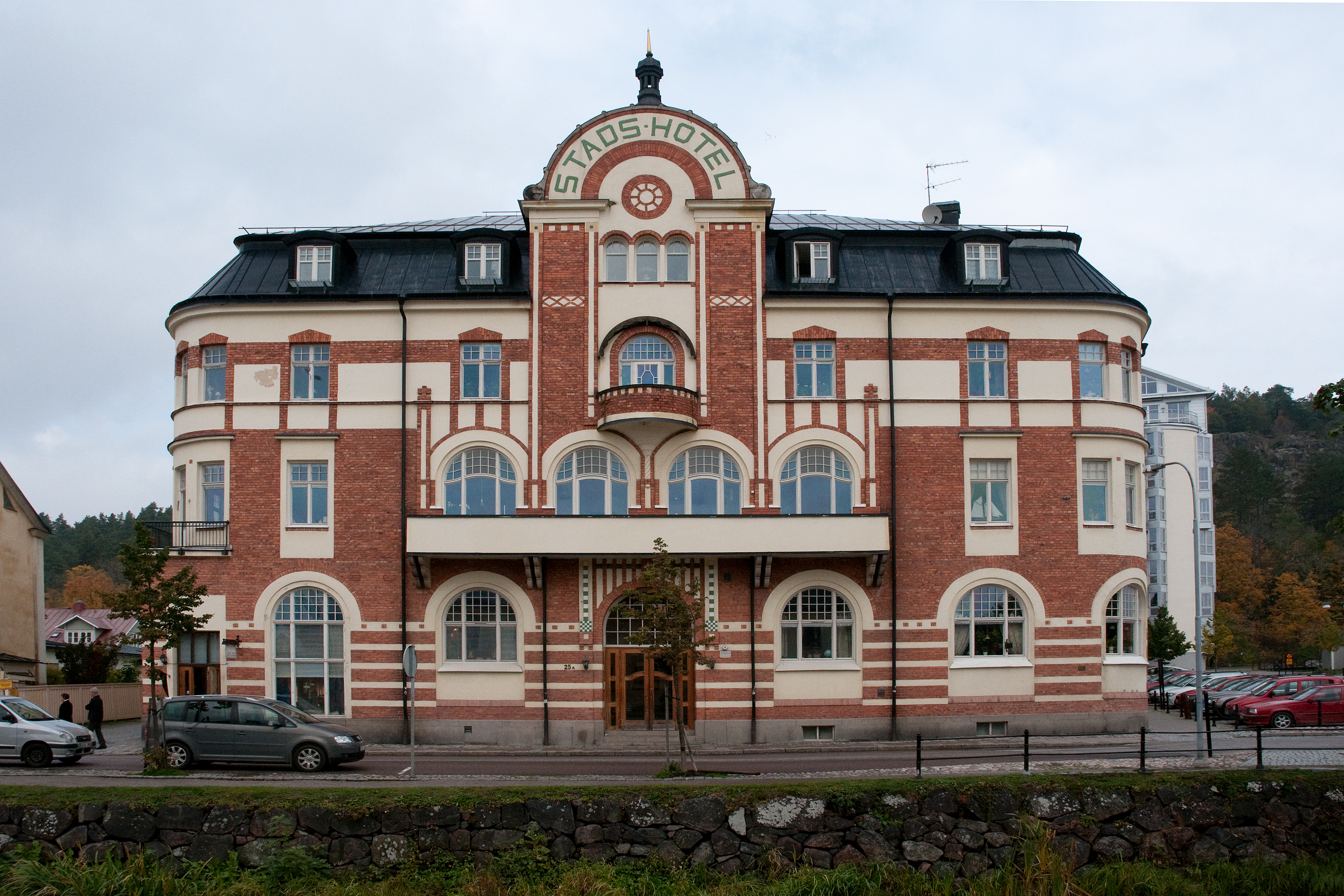 Stadshotellet i Söderköping